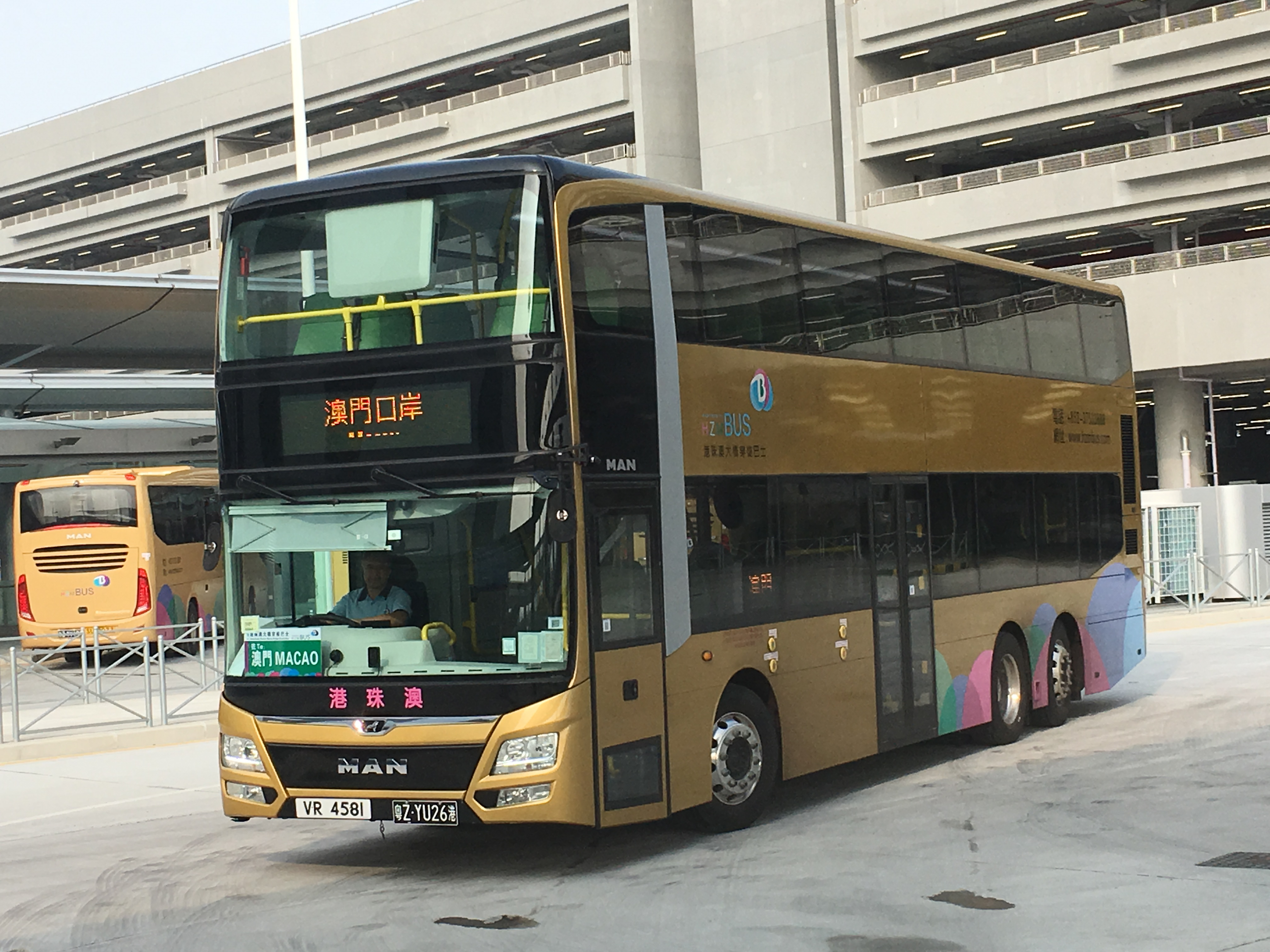 This photo is taken in Hong Kong-Zhuhai-Macao Bridge Macau Port.